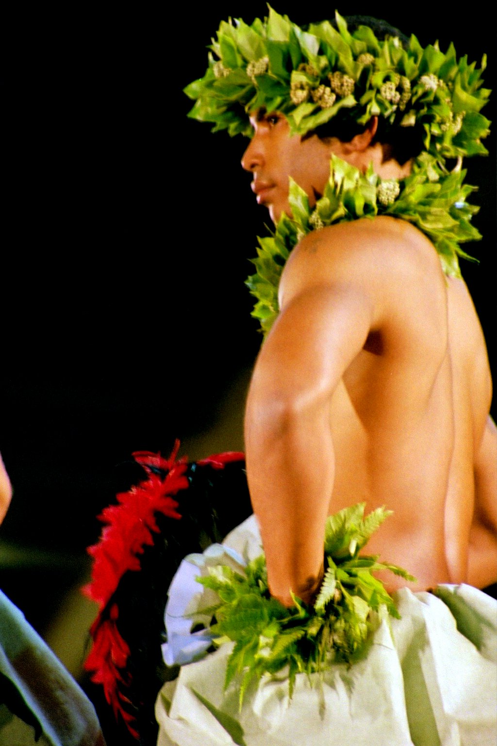 Tänzer mit ʻuliʻuli beim Hula kahiko, Merrie Monarch Festival 2003, Hilo, Hawaiʻi, USA; Pentax Z 20, Tamron Zoom AF/MF 3,8-5,6/28-200 mm aspherical